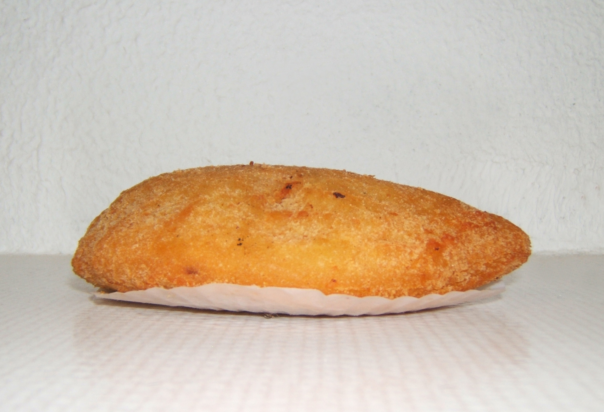 Risole, brazilian savory